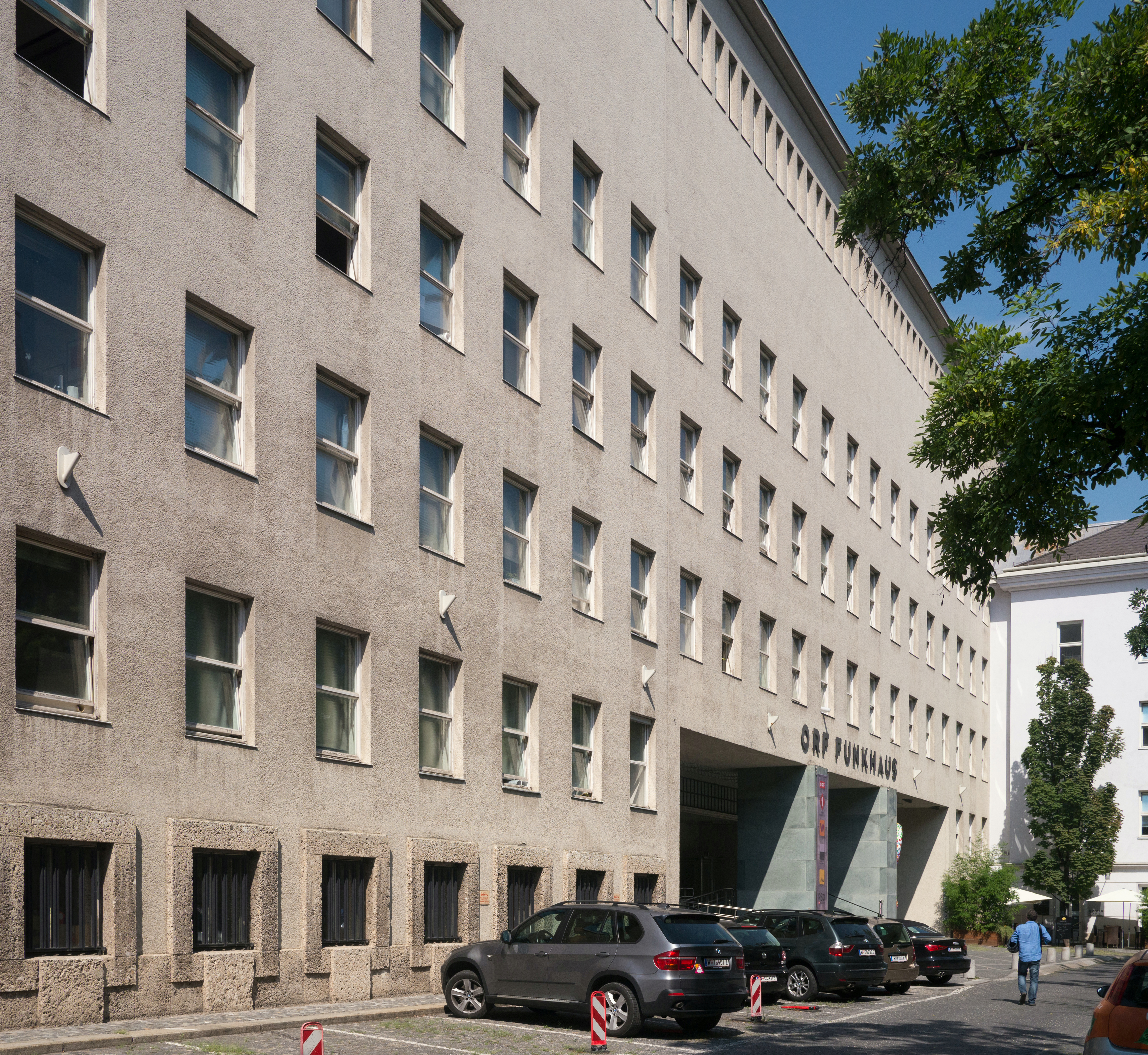 Funkhaus, ORF